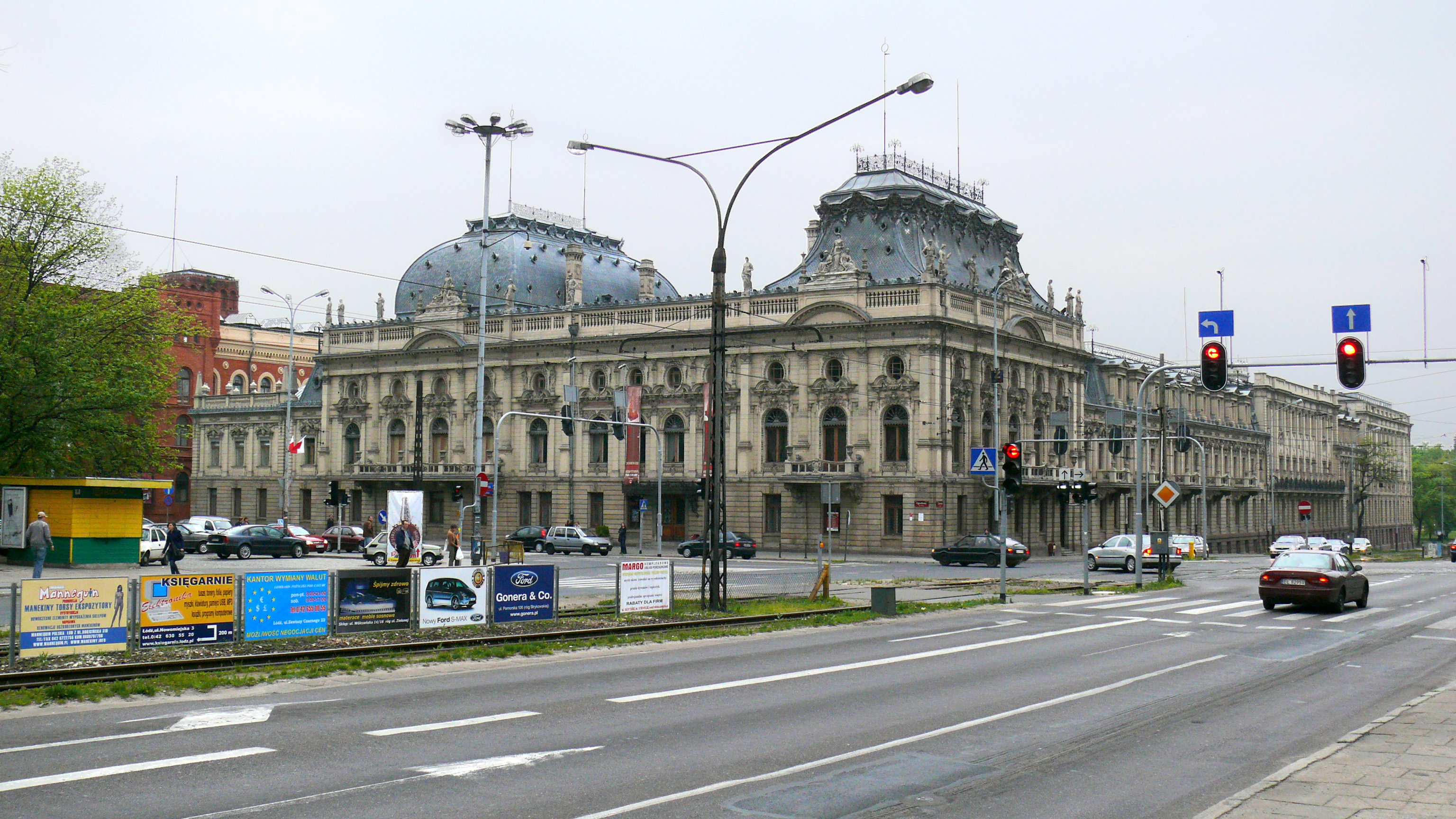 Pałac Poznańskiego w Łodzi